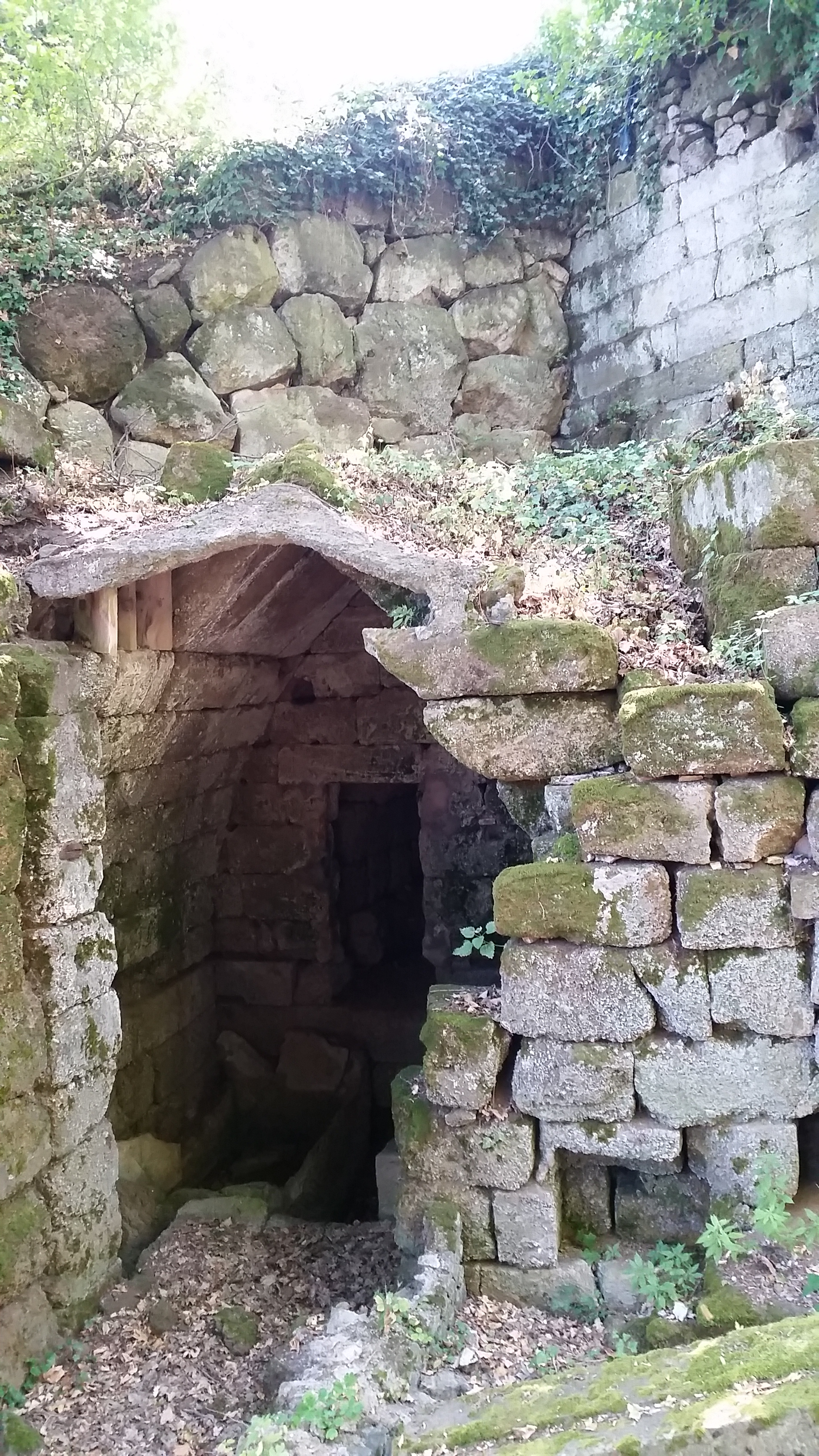 Mura telegonie e sorgente acqua Tuscolo - Castelli Romani